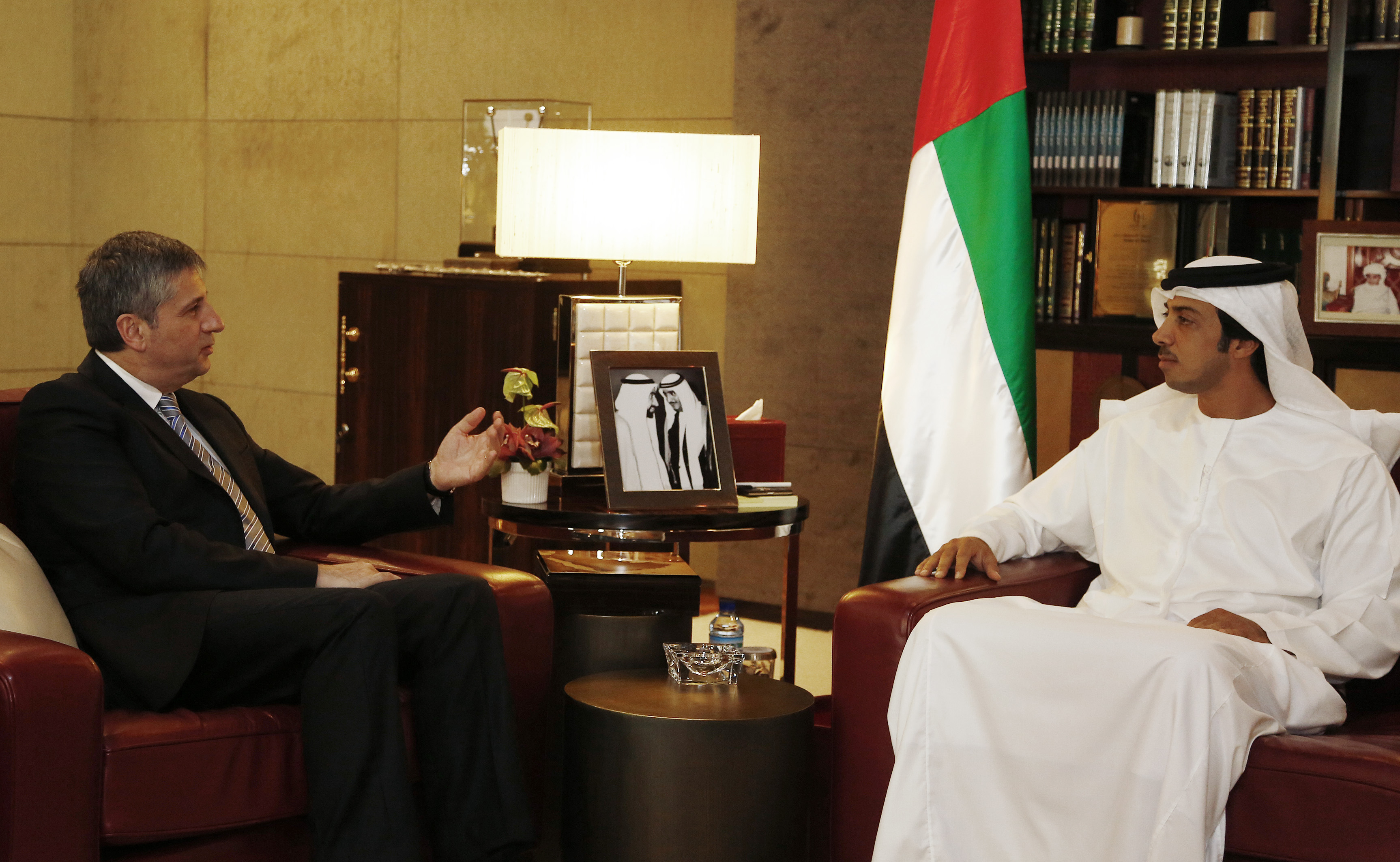 Arbeitsbesuch Vereinigte Arabische Emirate. Vizekanzler Michael Spindelegger trifft Minister Sheikh Mansour bin Zayed Al Nahyan. Abu Dhabi, 13.02.2013, Foto: Dragan Tatic